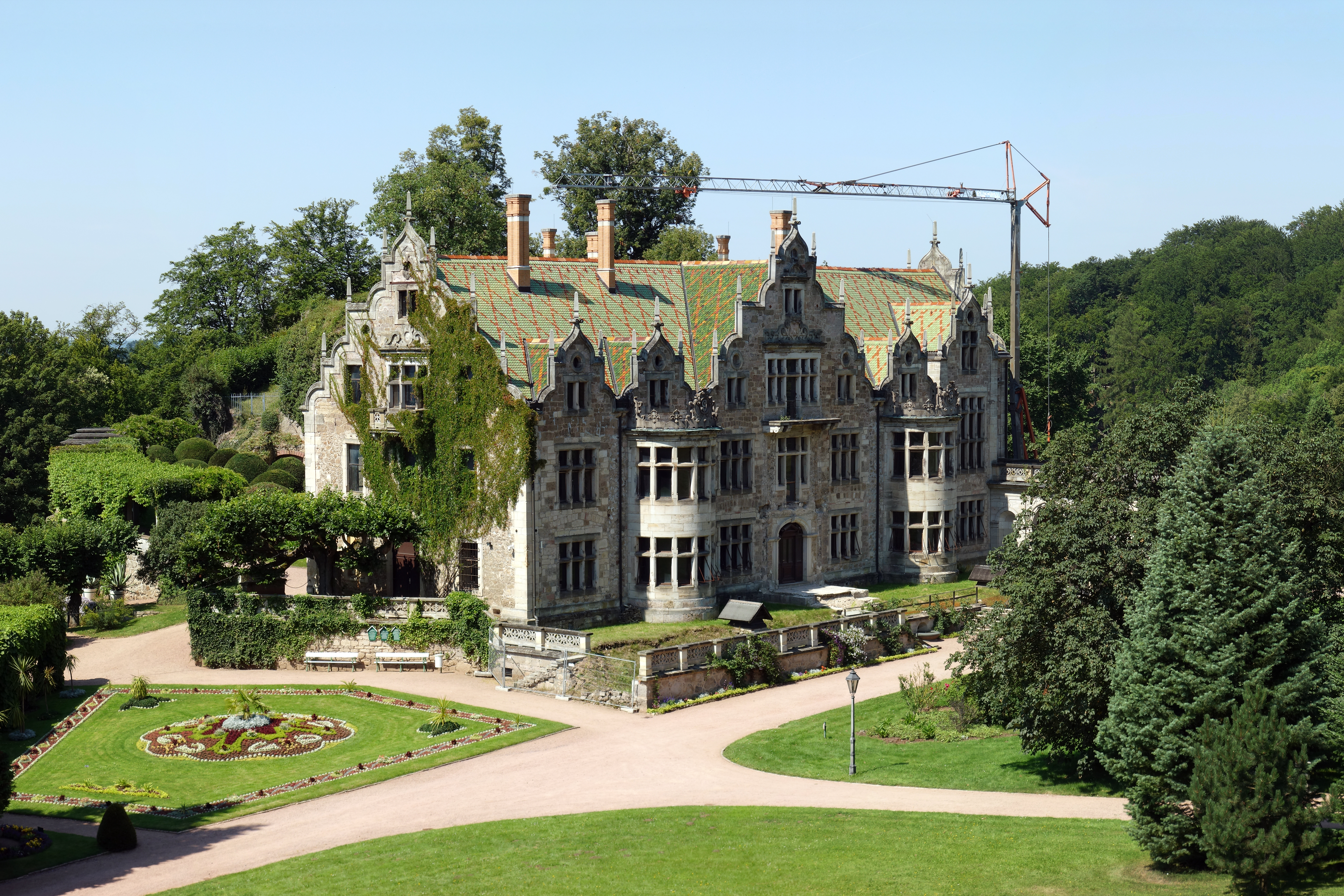 Das Schloss Altenstein befindet sich in einem weitläufigen Parkgelände, dem Altensteiner Park, und wurde 1736 als Wohnschloss (Landhaus) der Meininger Herzöge erbaut und nach 1800 als Sommerresidenz erweitert. Im Februar 1982 brannte das Schloss durch einen technischen Defekt bis auf die Außenmauern ab. Ab 1984 begannen erste Sicherungs- und Instandsetzungsmaßnahmen, die mit Unterbrechungen noch anhalten. Seit dem 20. Juli 1995 gehört die Gesamtanlage der Stiftung Thüringer Schlösser und Gärten. Der Innenausbau soll 2015 abgeschlossen sein.